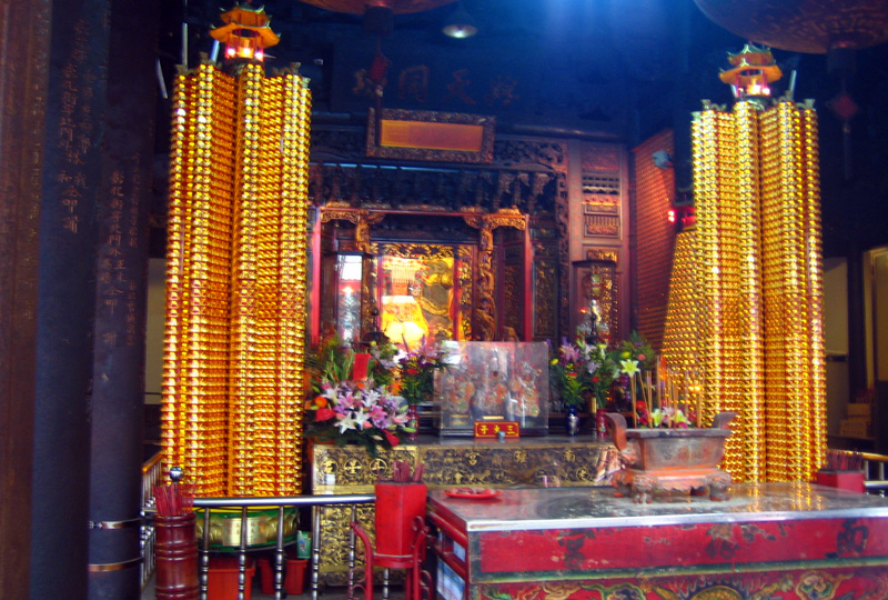 南瑤宮正殿